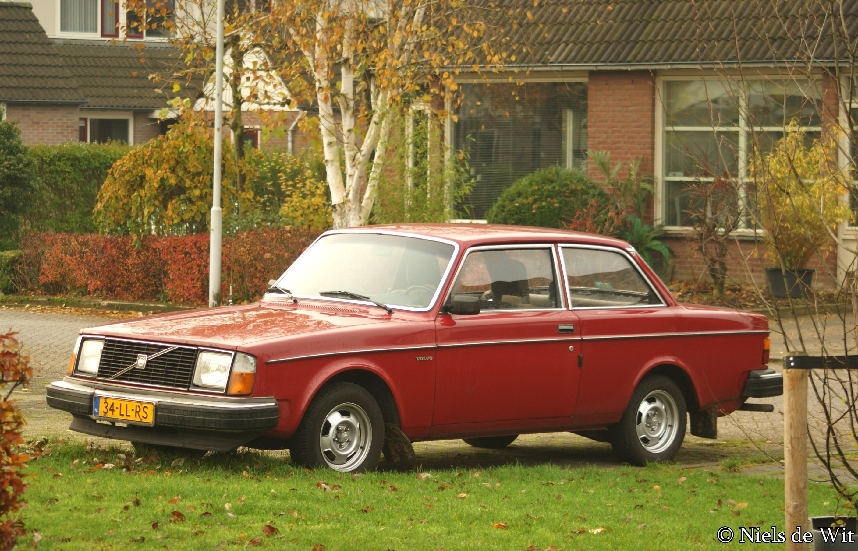 34-LL-RS